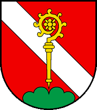 Wappen von Villarbeney Kanton Freiburg Schweiz